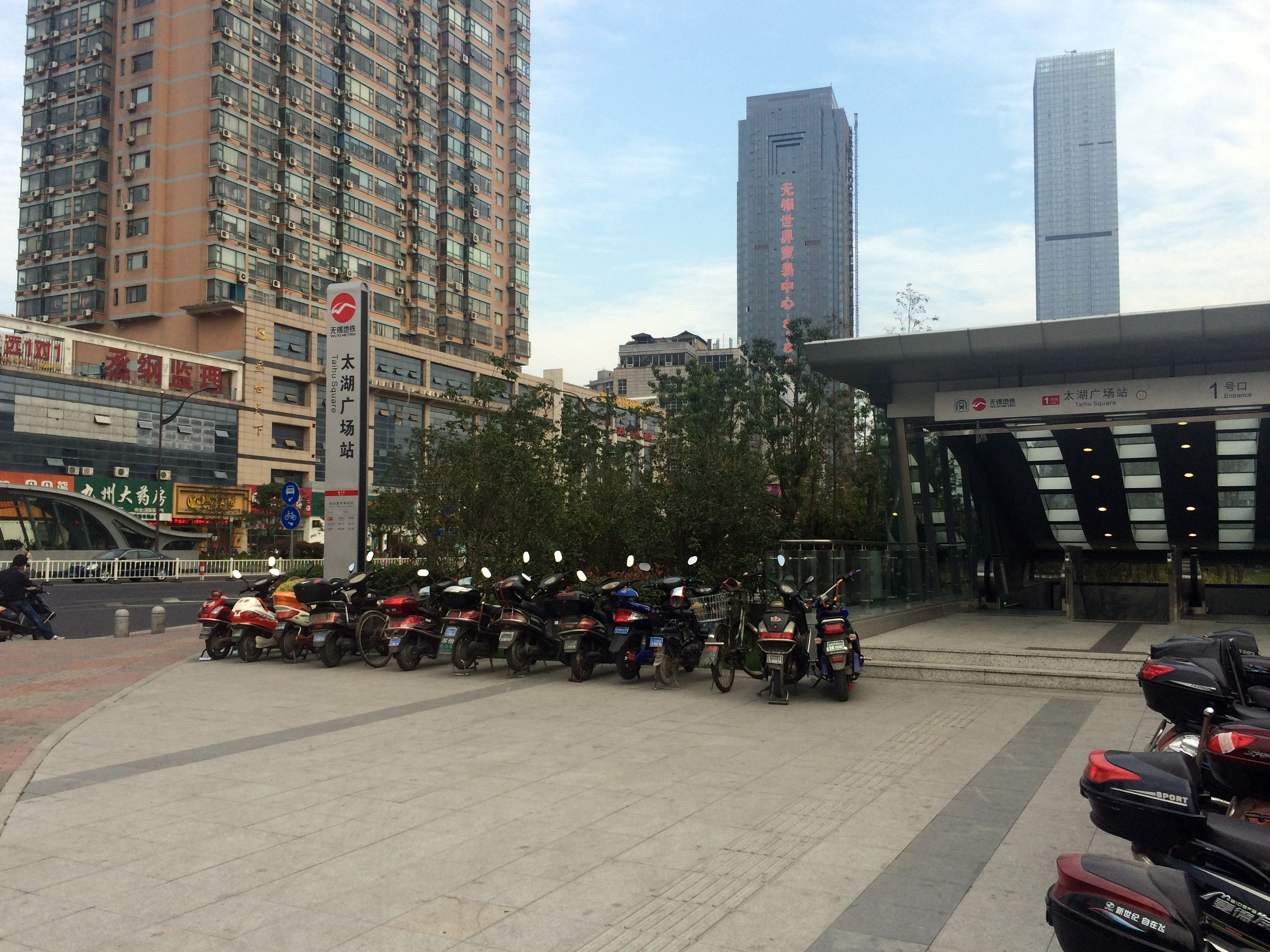 無錫地鐵1號口